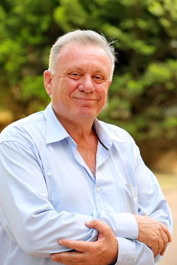 חבר הכנסת איתן ברושי בביקור במרכז הבינתחומי הרצליה